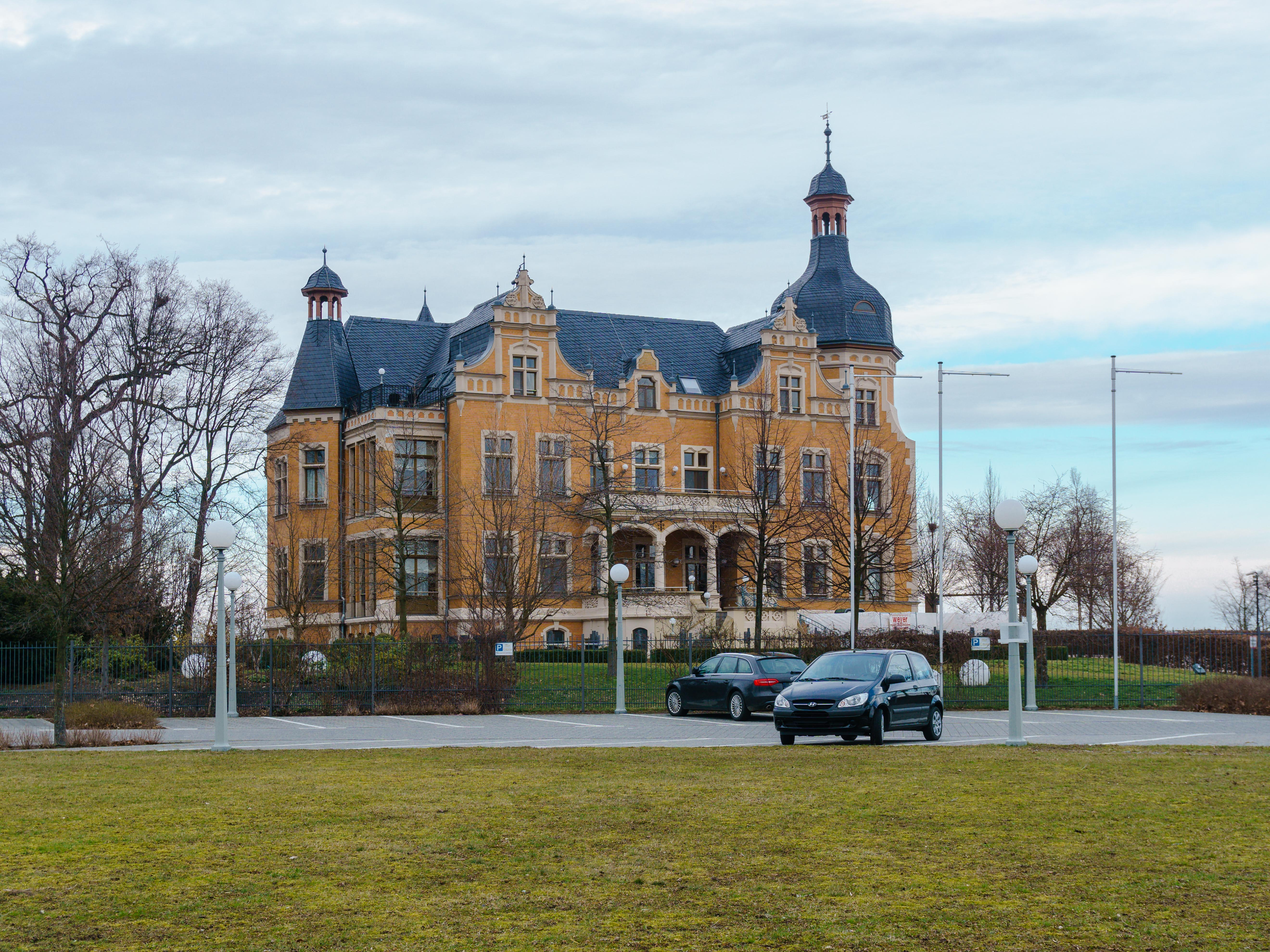 Biermannsche Villa, Berliner Straße 12 am Großen Goitzschsee in Bitterfeld